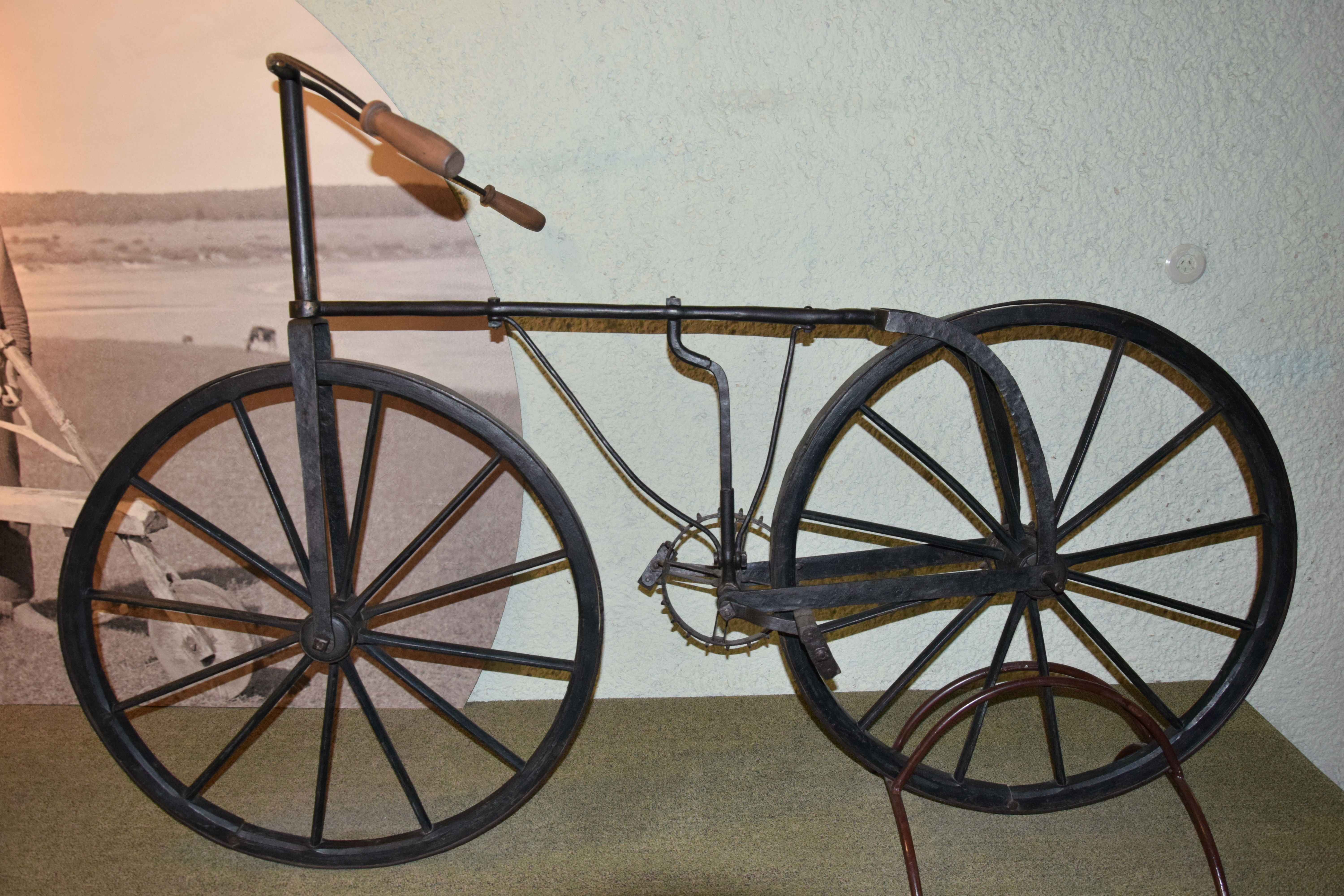 Tai namų darbo dviratis. Jis yra vienas seniausių Šiaulių „Aušros“ muziejaus eksponatų, rastas 1927 metais kraštotyros ekspedicijos metu pas 1913-aisiais jį nukaldinusį nagingą Pakruojo rajono Lygumų apylinkės Aleknaičių kaimo kalvį Kazimierą Šuopį.